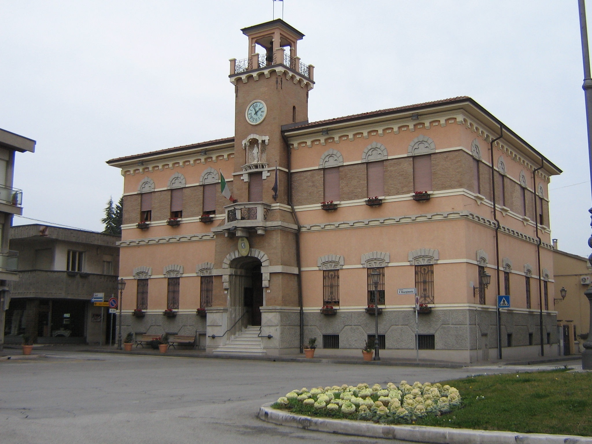 Municipio di Gambettola (FC), Italy